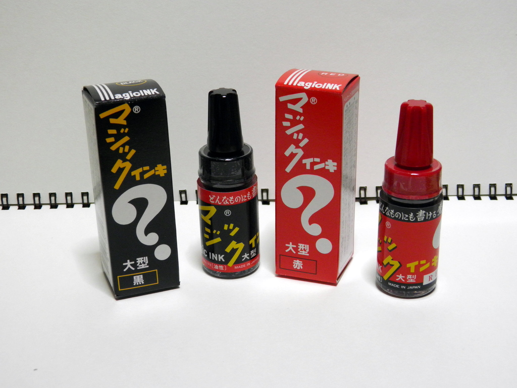 寺西化学工業株式会社「マジックインキ」黒色、赤色